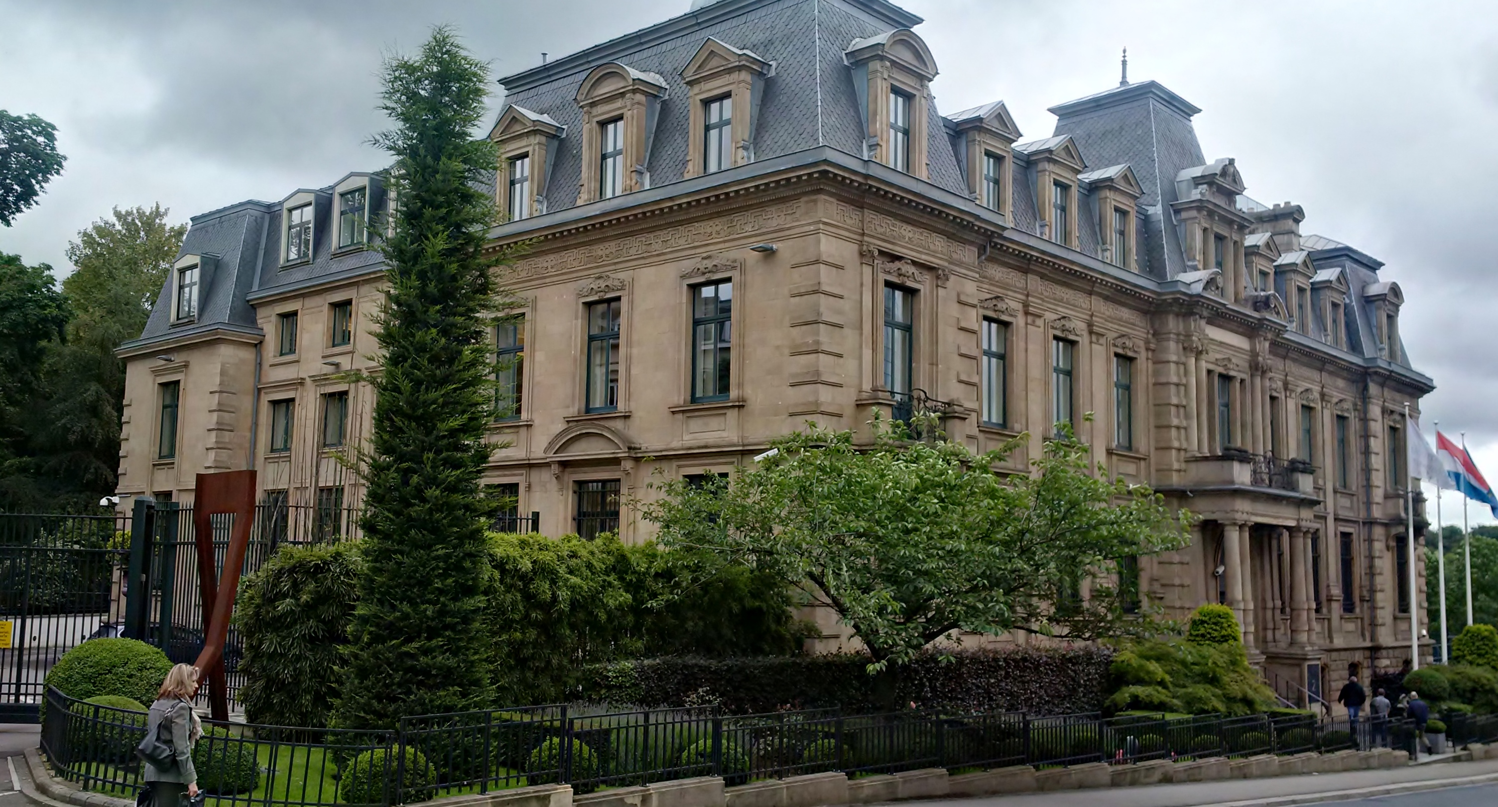 D'Gebai vun der Zentralbank um Boulevard Royal an der Stad.